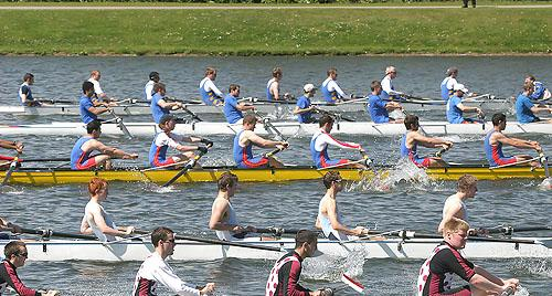 2003 Regatta in England